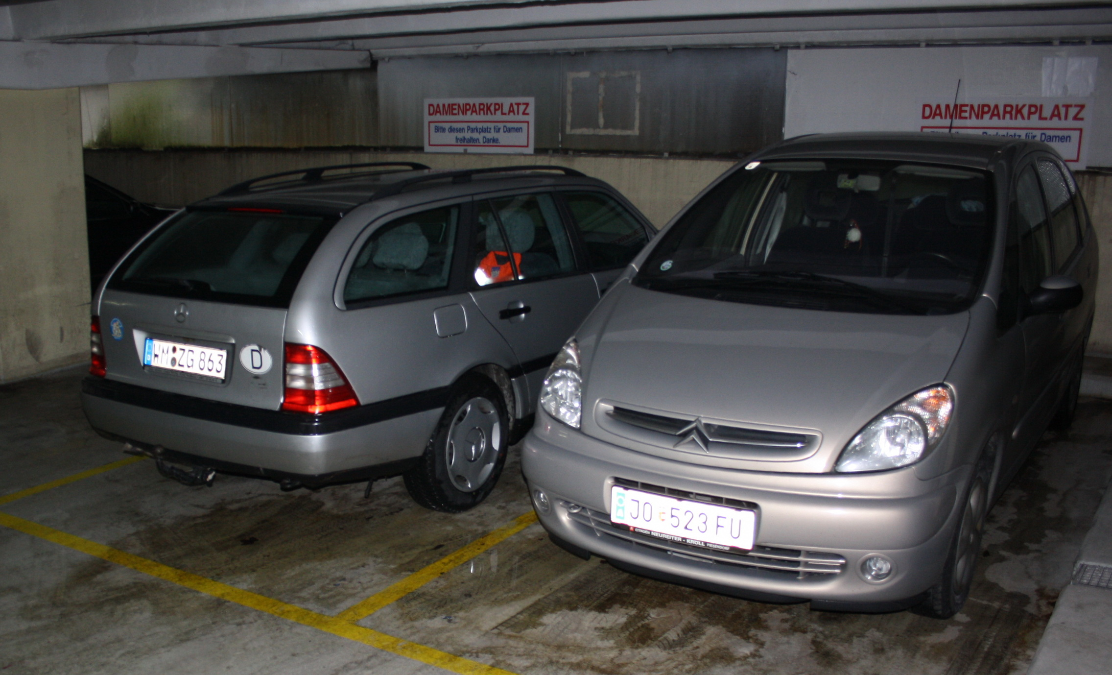 Frauenparkplatz im Parkhaus in Bad Gastein in Österreich.